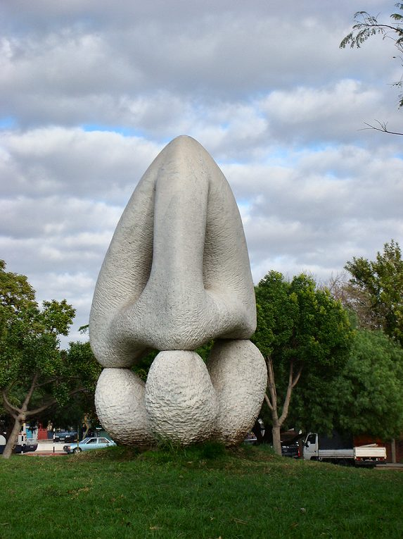 Escultura Democracia, por Guillermo Riva-Zucchelli (1996). Ubicada en el Parque de las Esculturas, Bolívar, Montevideo, Uruguay.